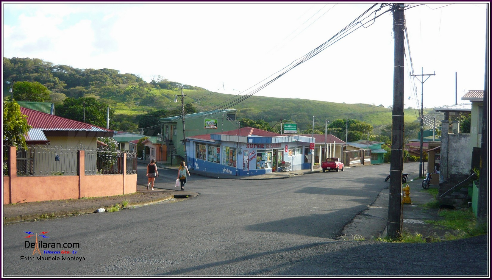 Barrio El Carmen De Tilarán